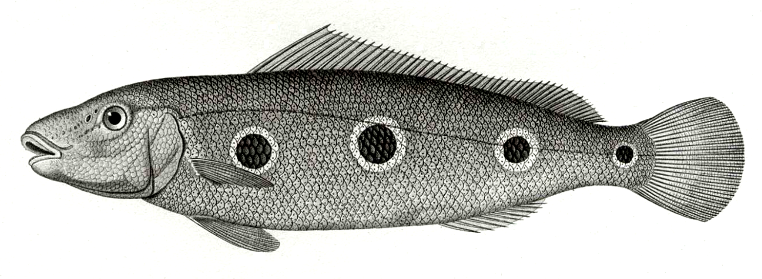 Cichla orinocensis. Humboldt, 1821.